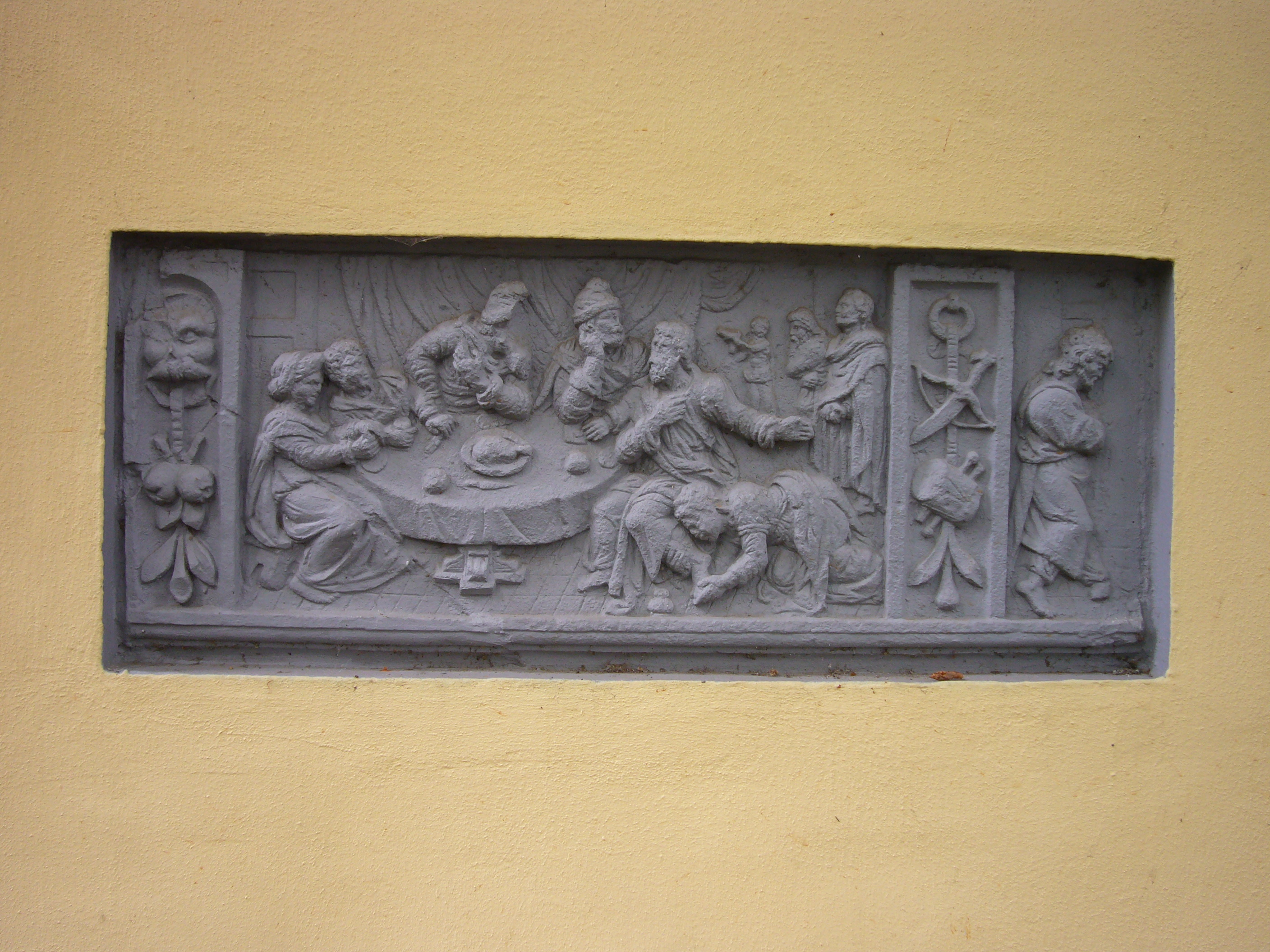 Kurfürstliches Gärtnerhaus in Bonn, Ortsteil Weststadt: Relief